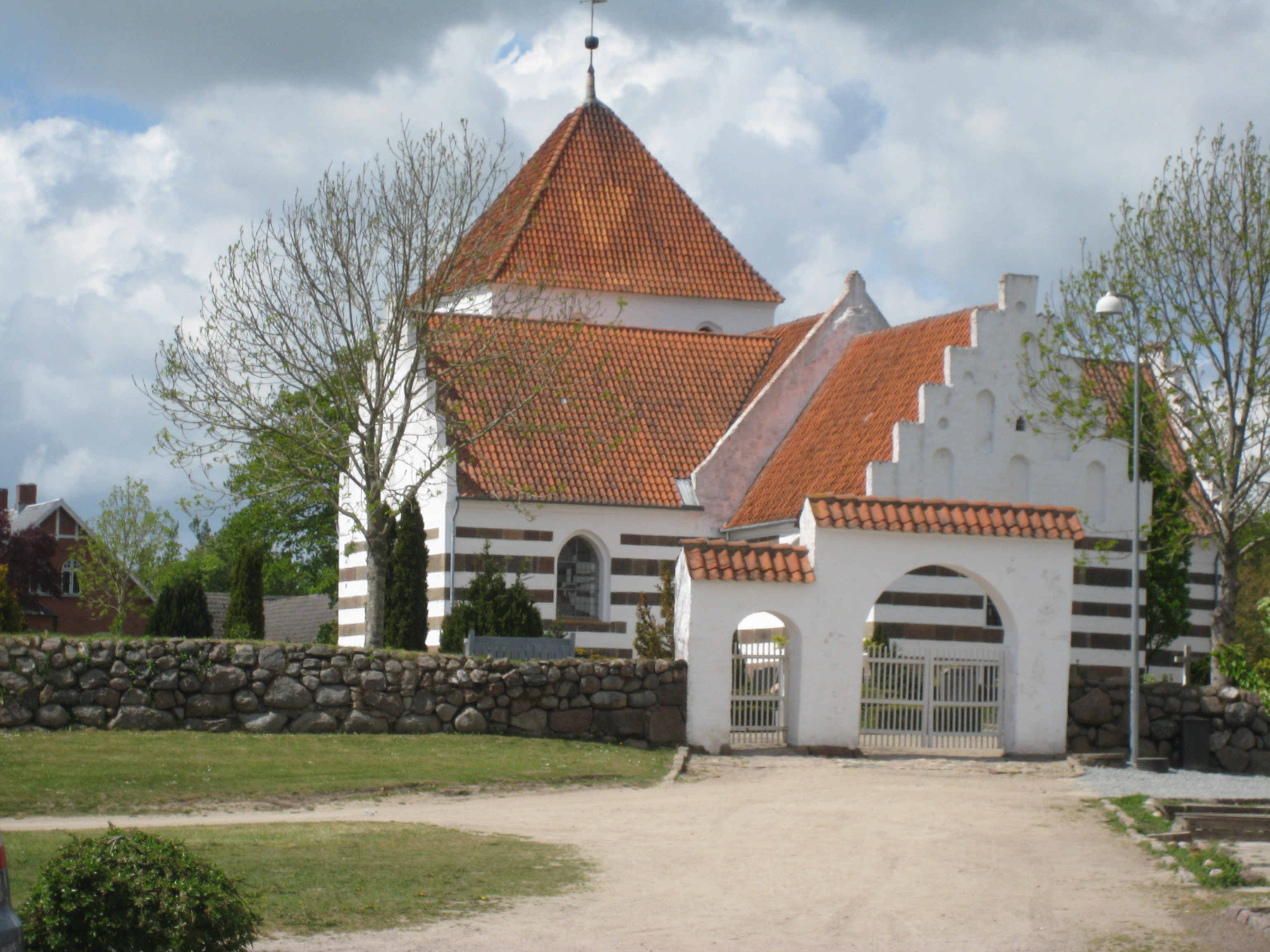 Søndersø Kirke på Fyn